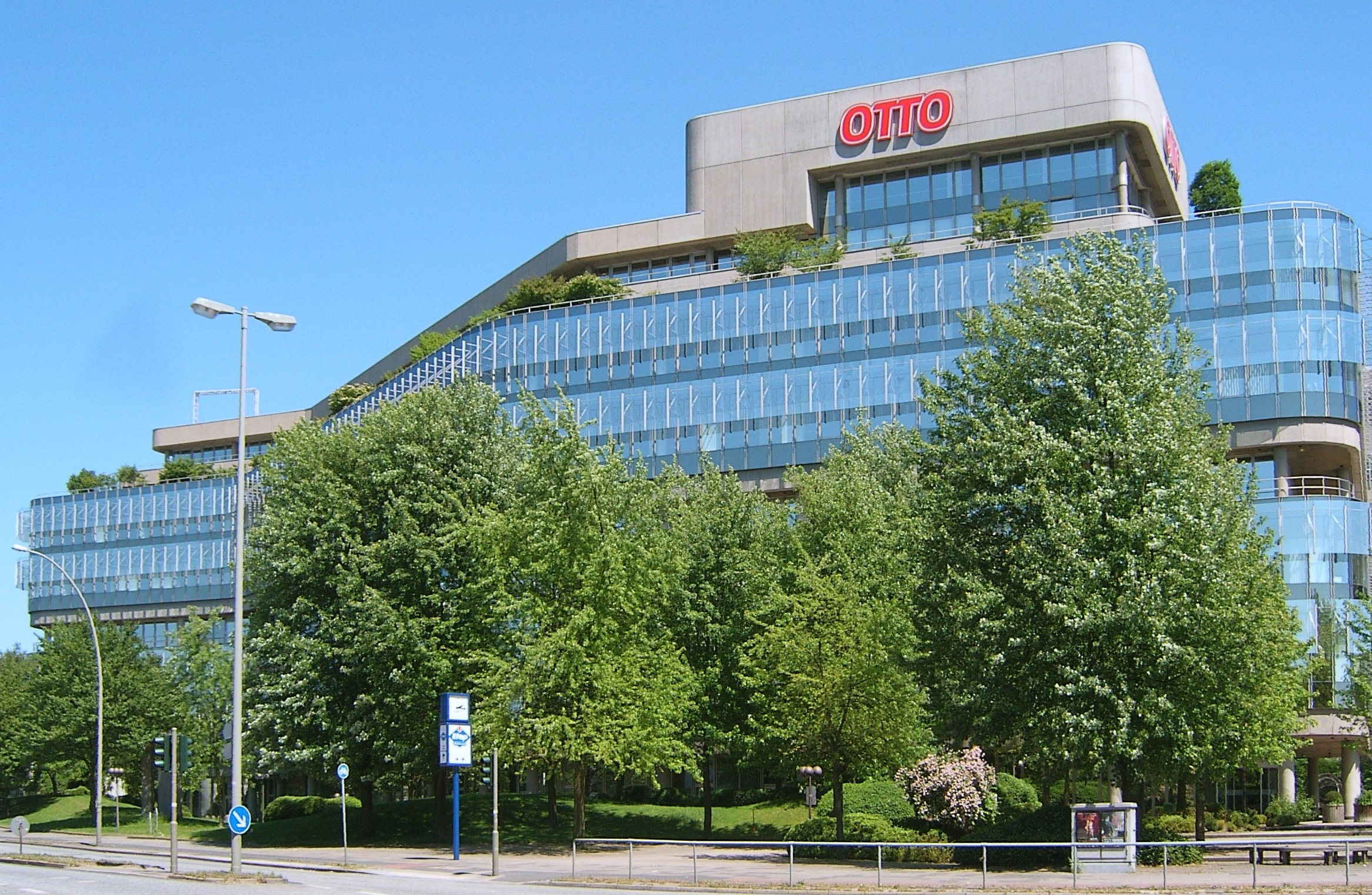 Die Hauptverwaltung des Otto-Versand in Hamburg-Bramfeld.